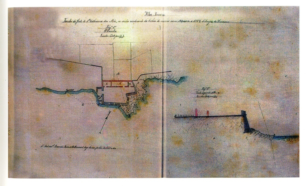 "Tombo do forte de Sta. Catharina das Móz...", Ilha Terceira (Açores), Portugal.